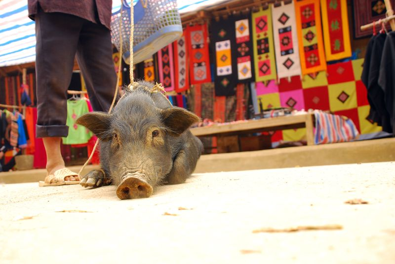 A black pig black pig in Sa Pa, Vietnam.